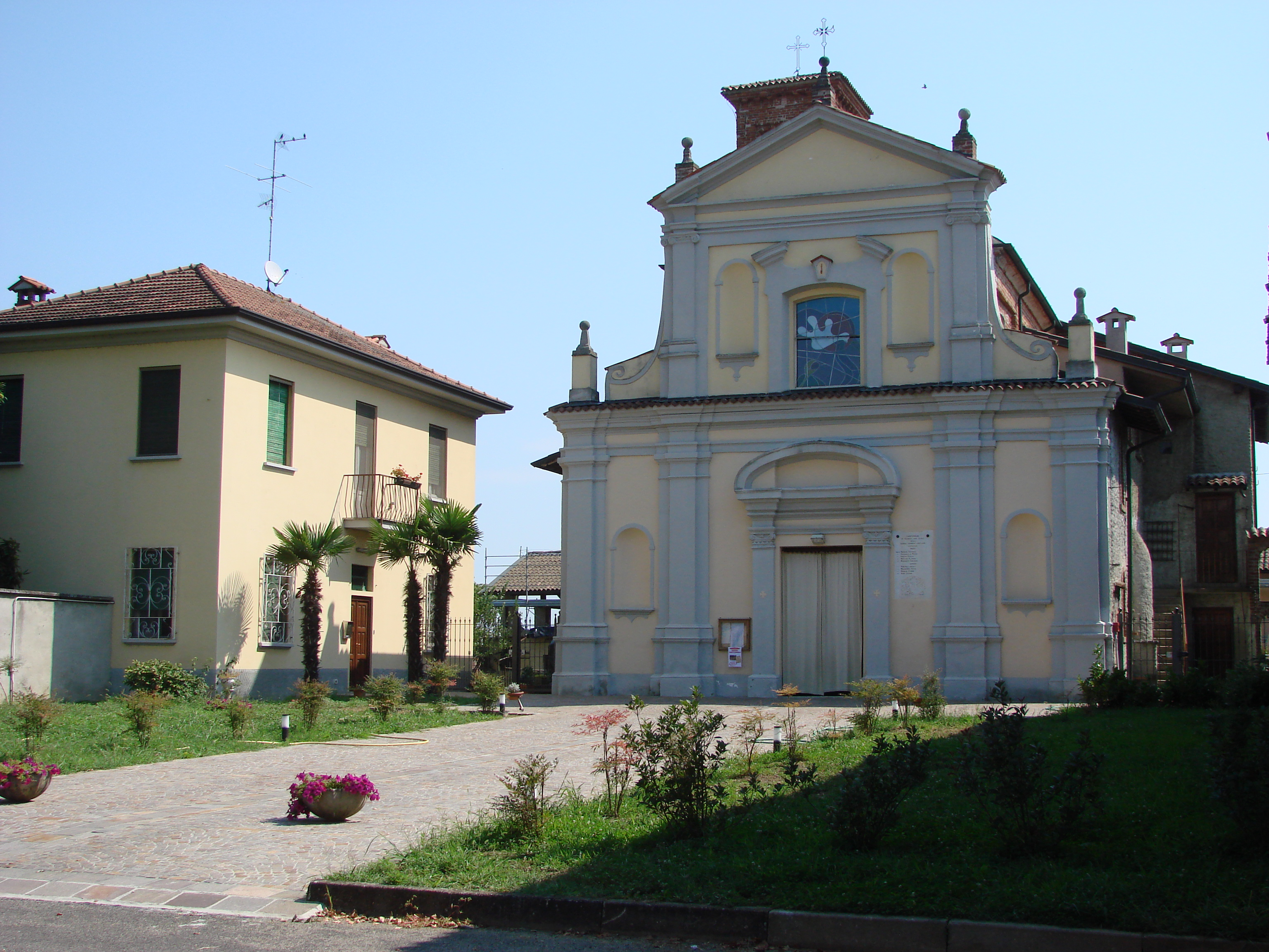 Chiesa parrocchiale San Brizio, Frazione Samperone